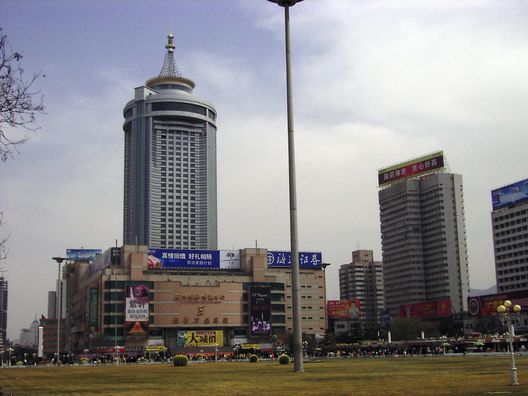 广场